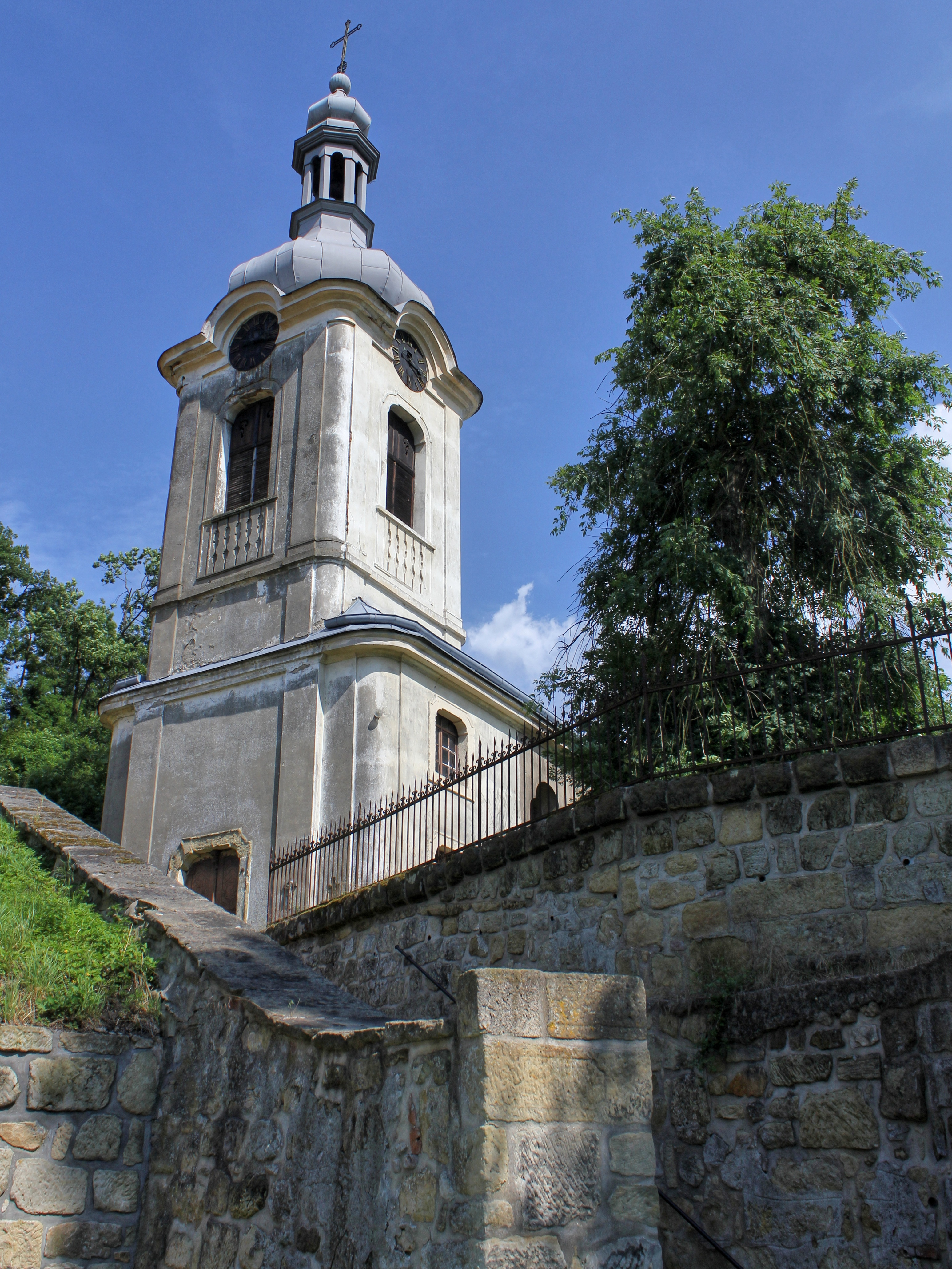 Kostel sv. Bartoloměje (Strenice), V část vsi, Strenice